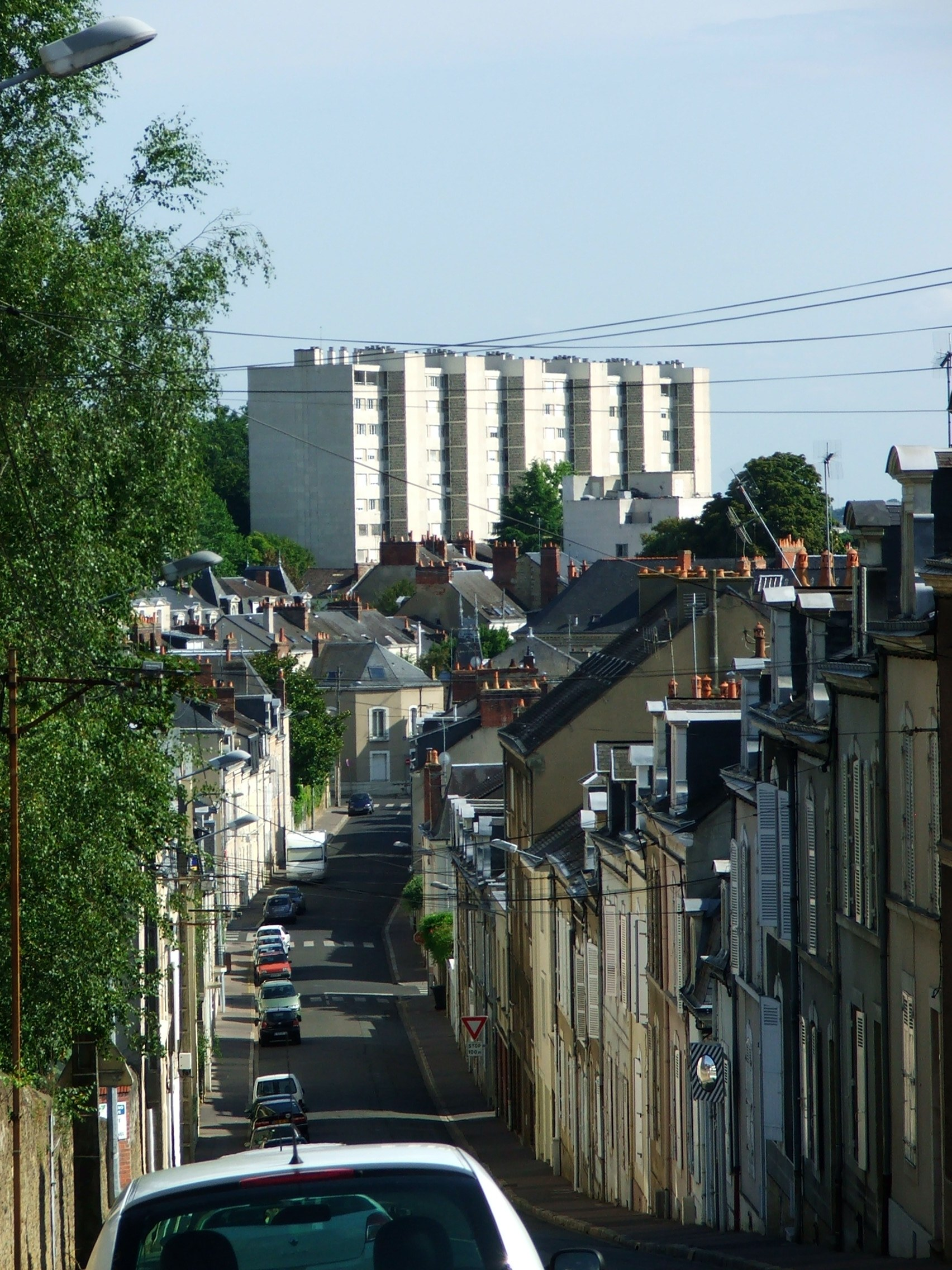 Alignement d'habitations dîtes "mancelles", rue Julien Bodereau au Mans.